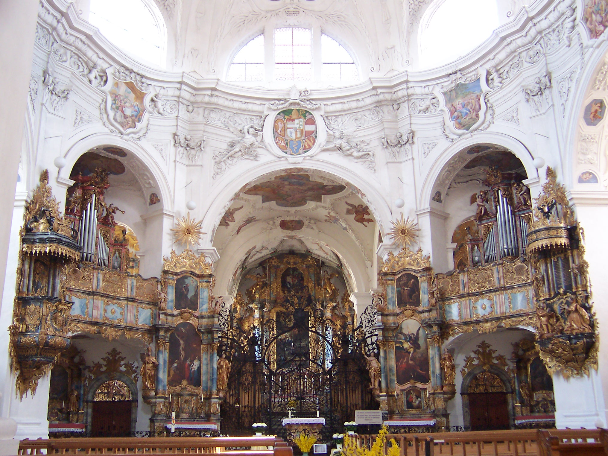 Innenansicht der Klosterkirche in Muri, Kanton Aaargau, Schweiz.